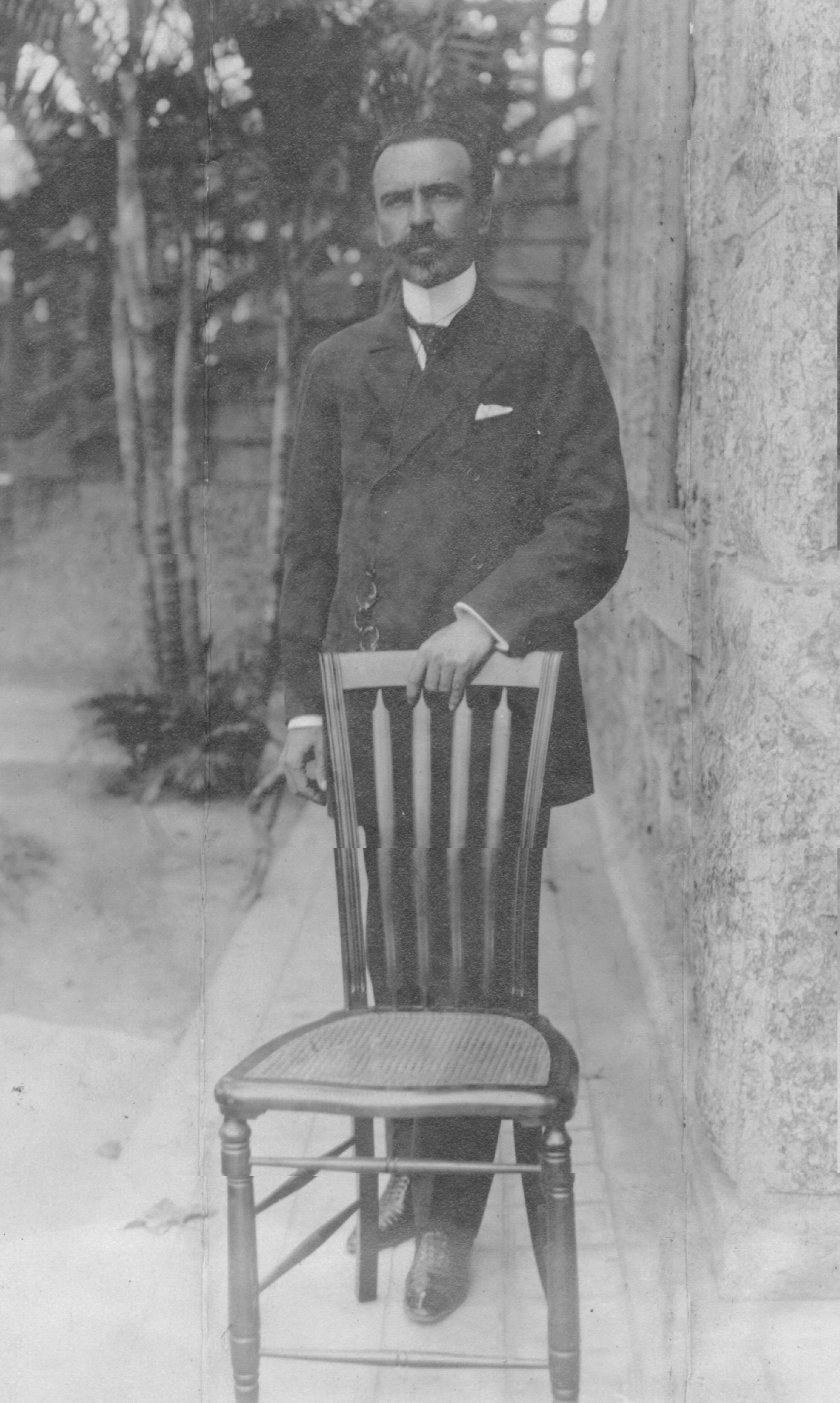 Imagem do Fundo Correio da Manhã.